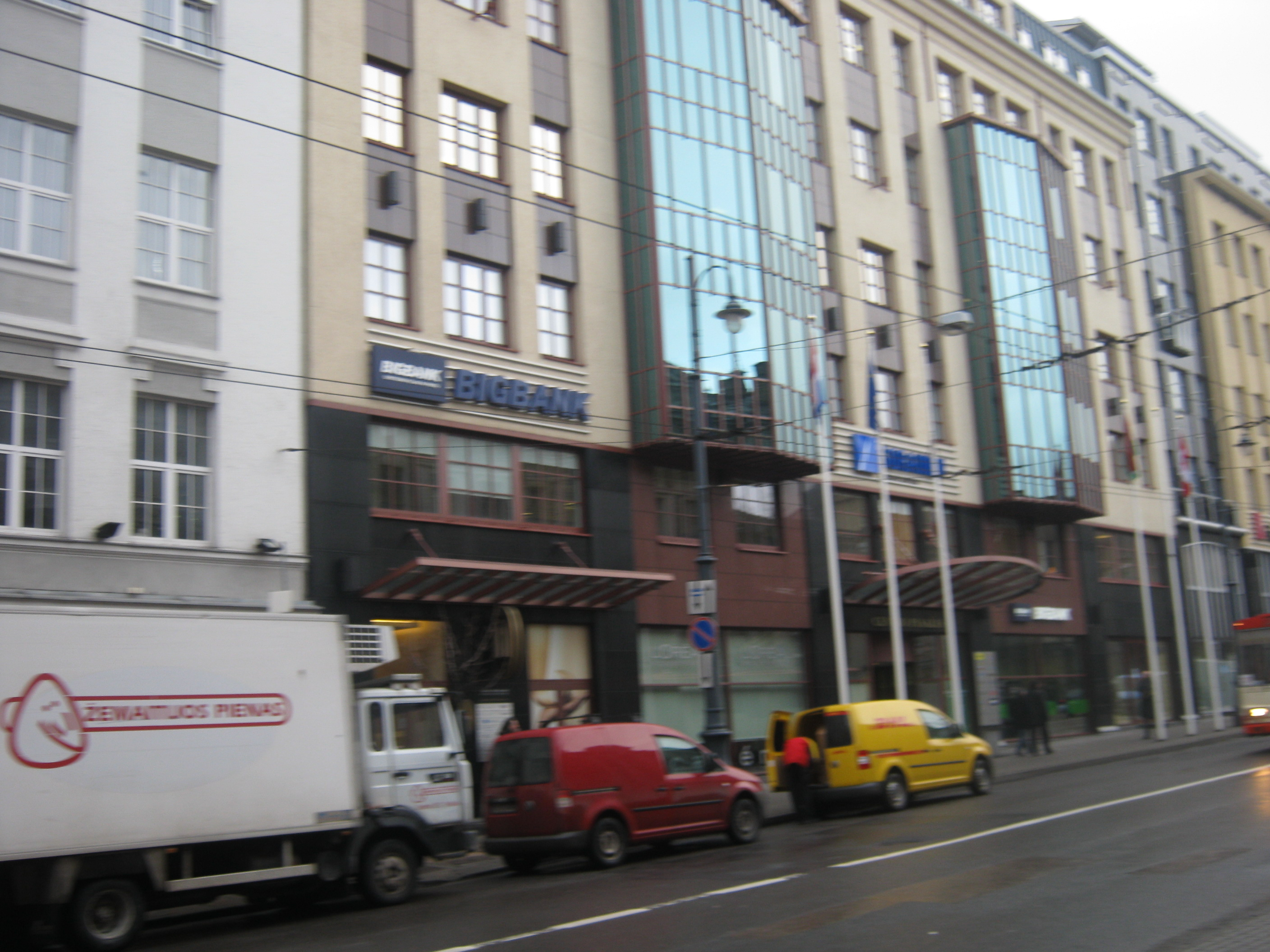 BigBank